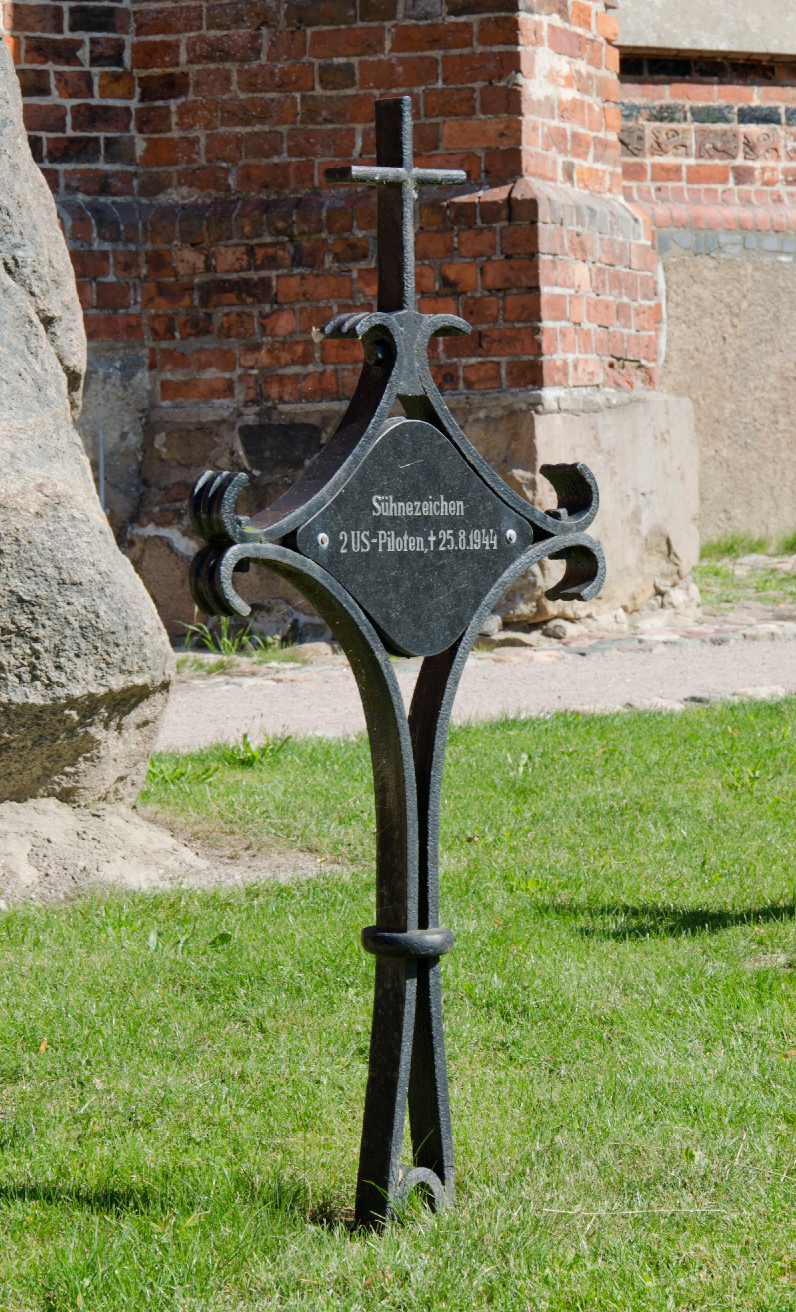 Steffenshagen, Sühnezeichen für die beiden am 25.08.1944 ermordeten US-Piloten